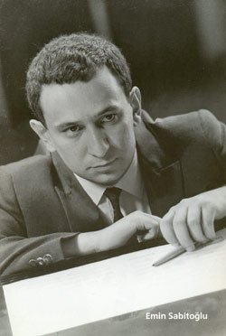 resmi facebook sayfasından alınmışdır